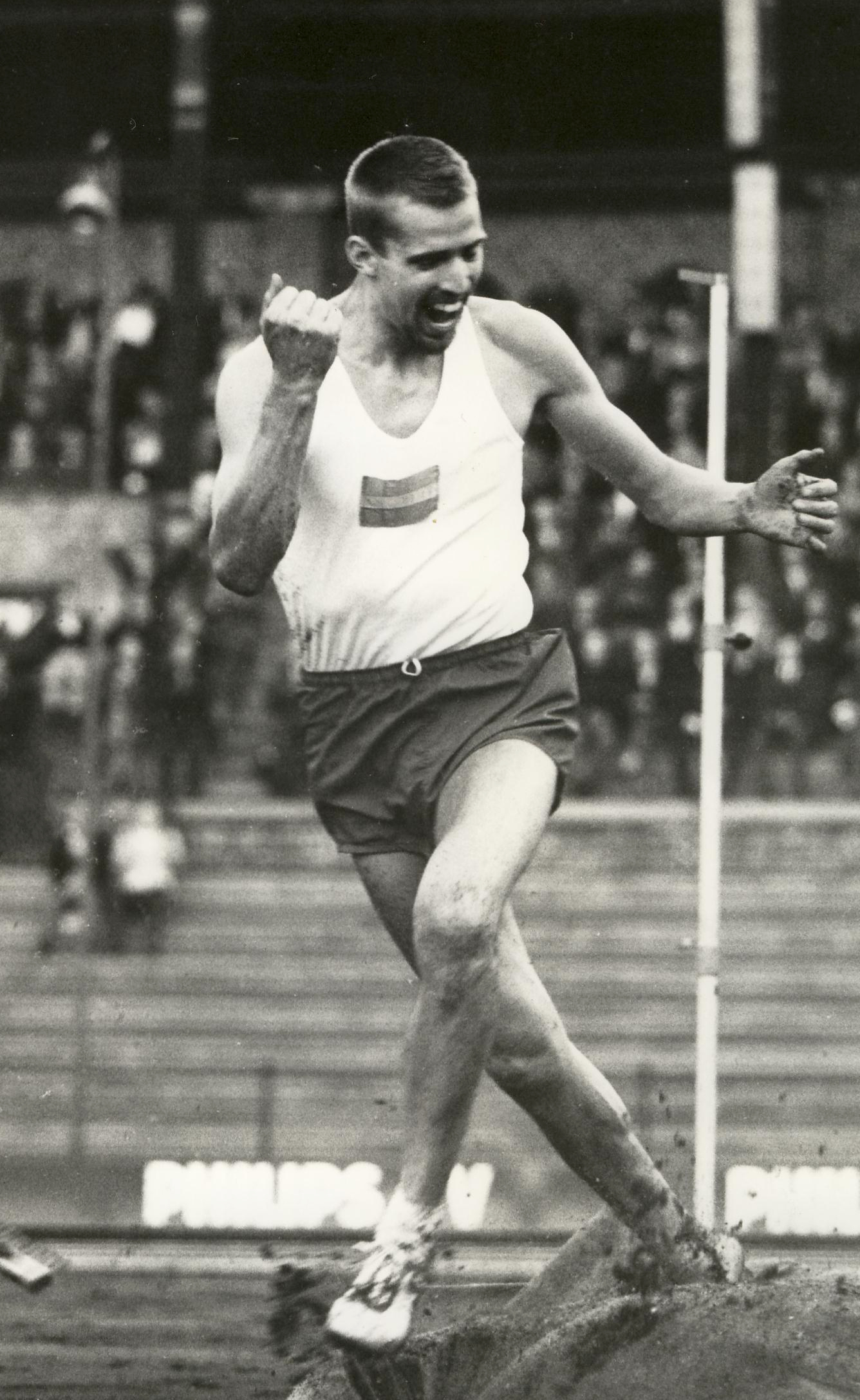 Stig Pettersson